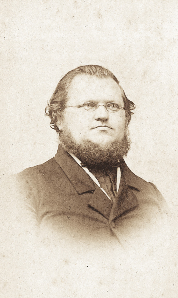 Michał Awgust Brojer (1801–1871)